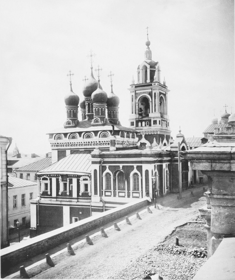 Церковь Георгия Победоносца на Псковской горе